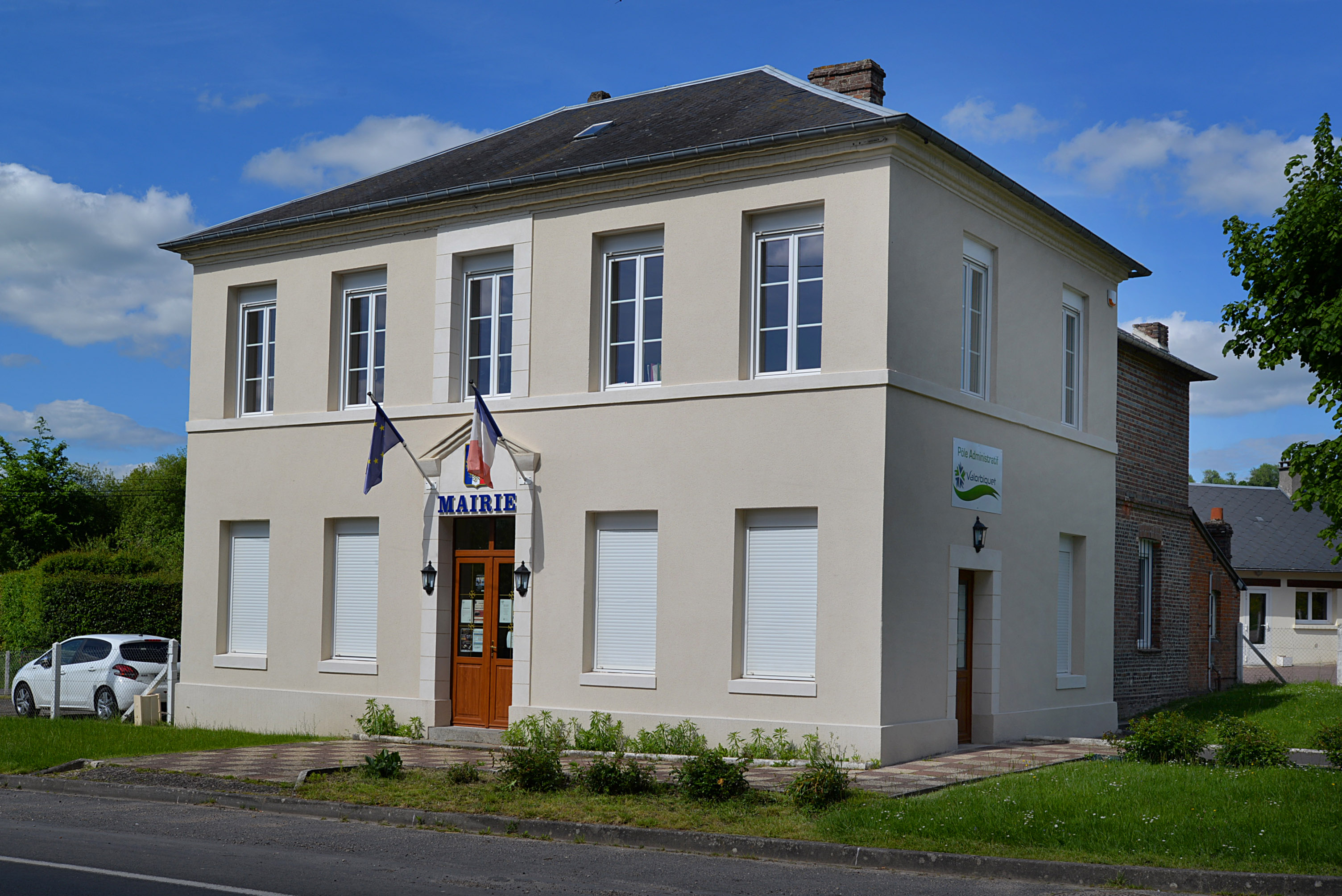 Saint-Julien-de-Mailloc (Calvados)